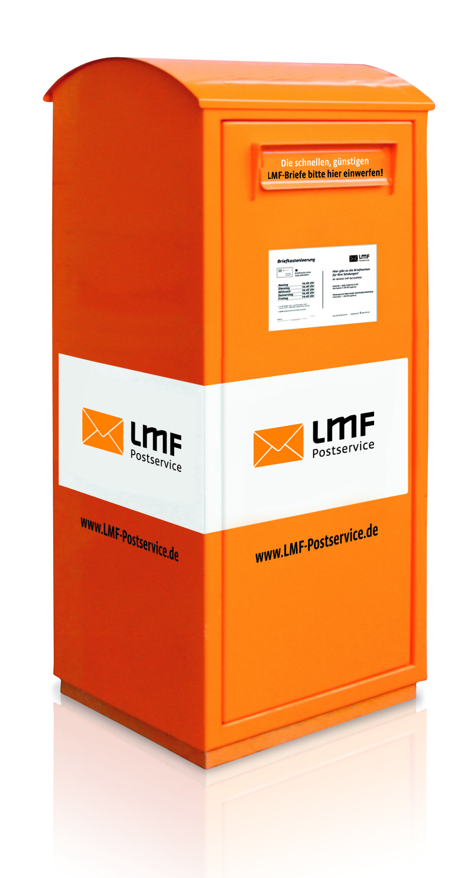 Briefkasten des LMF-Postservice, eine Marke der pd.MEDIENLOGISTIK